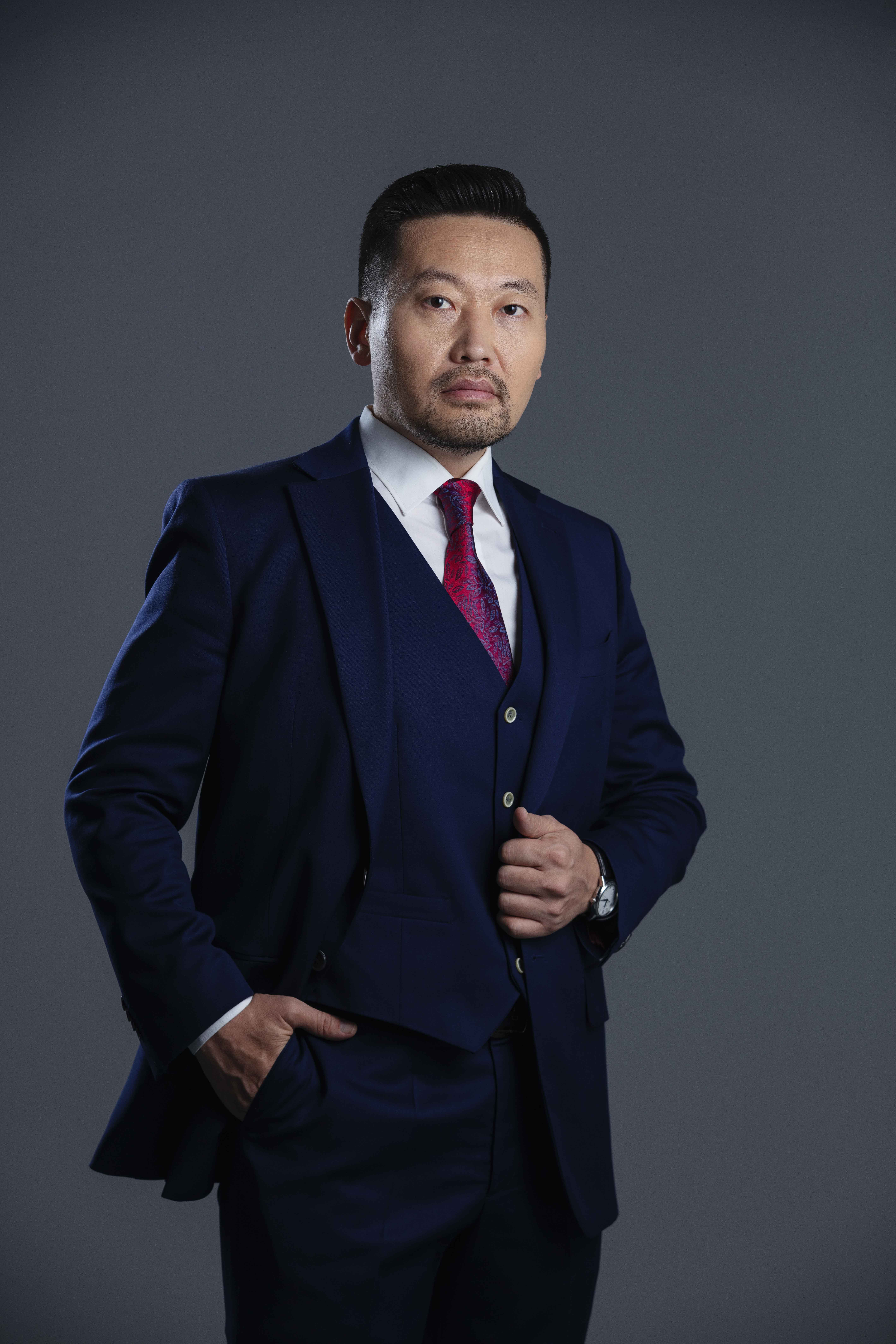 Монгол: Х.Ганхуяг